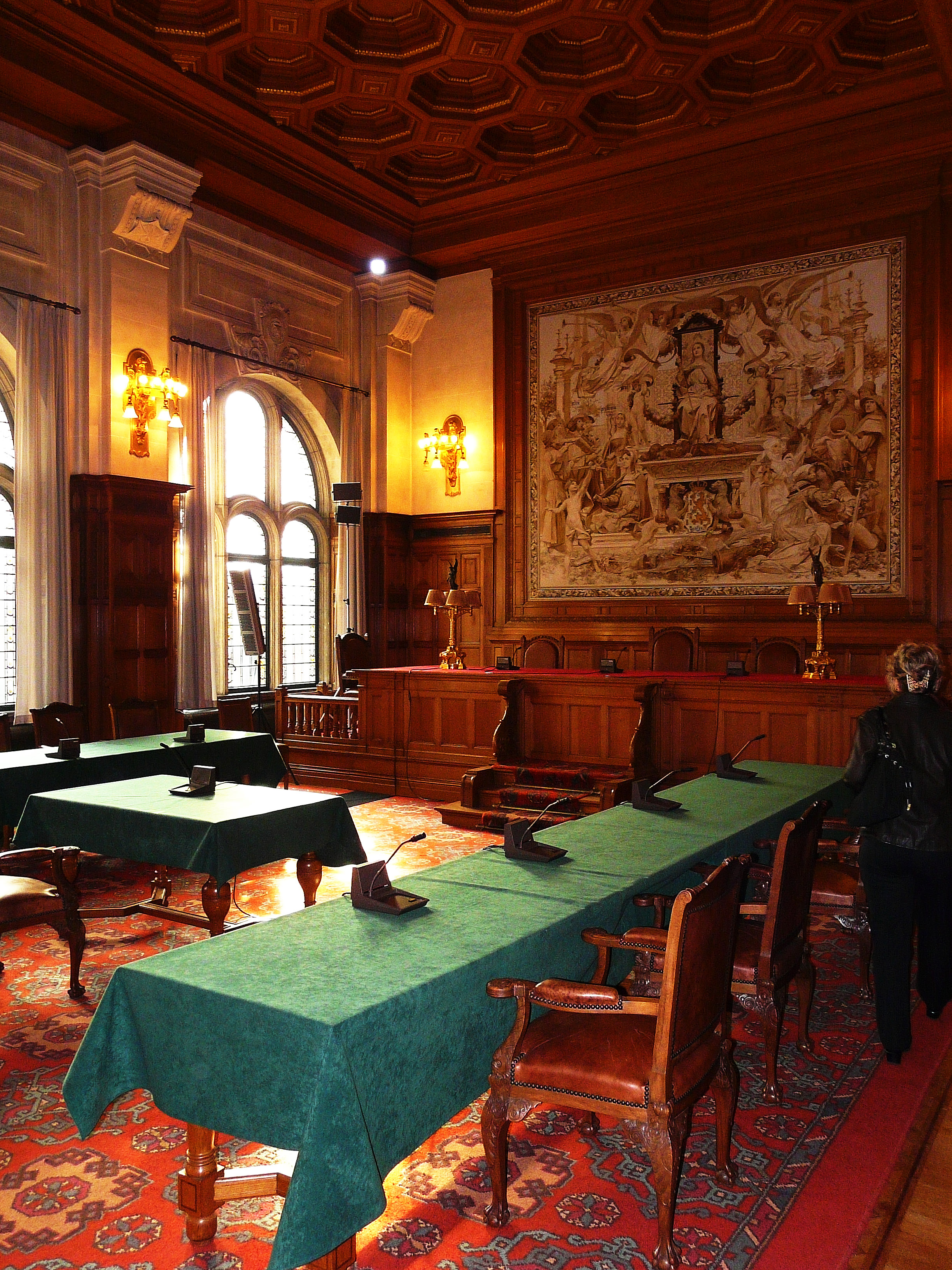 Une des salles de réunion de la Cour permanente d'arbitrage siégeant dans le Palais de la Paix au même titre que la Cour internationale de Justice